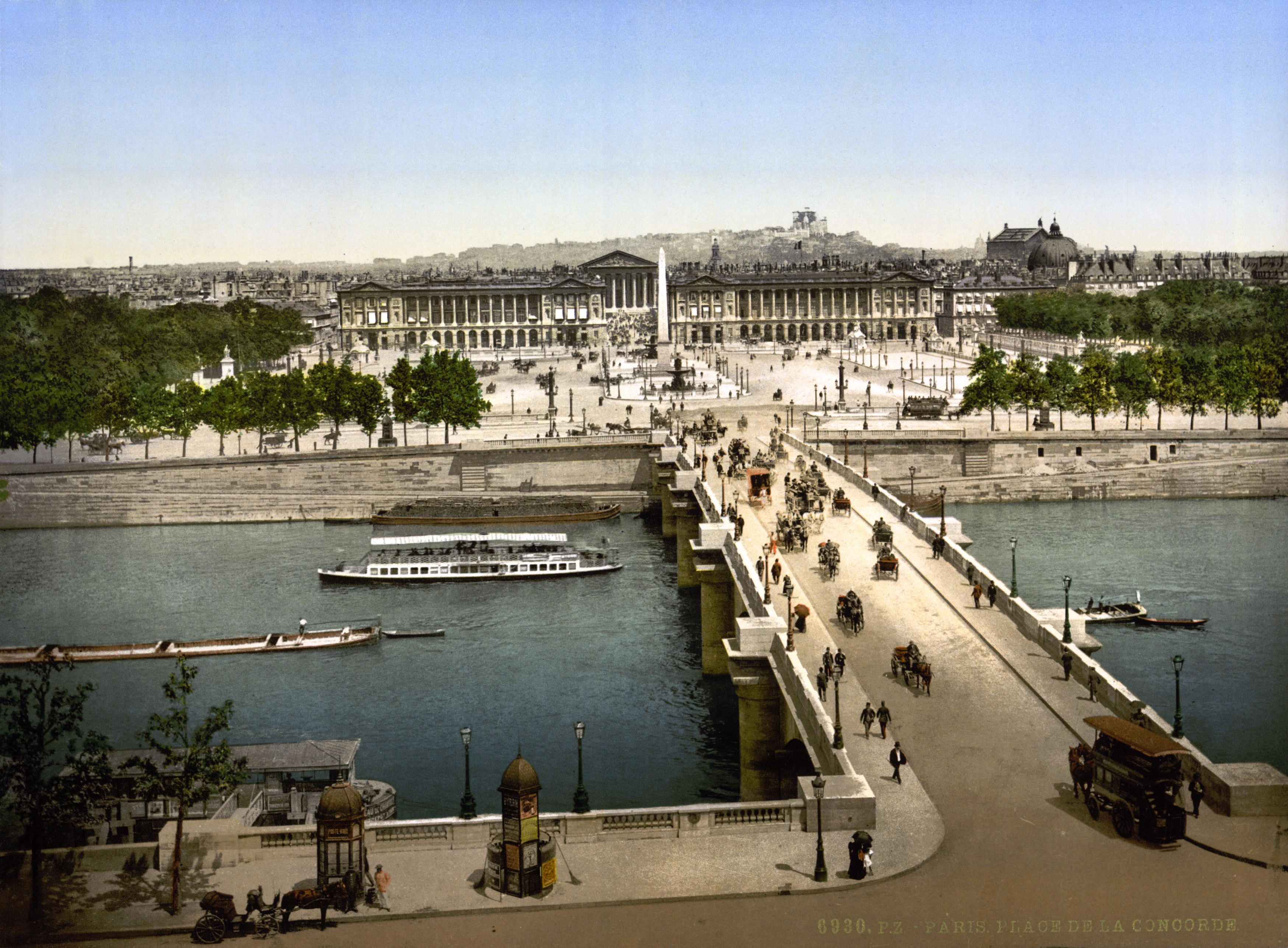 Place de la Concorde, Paris, France